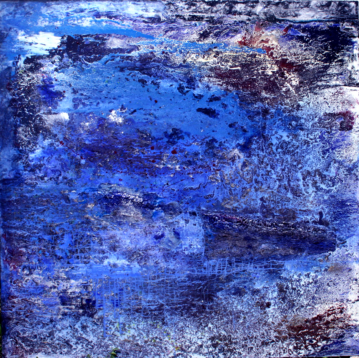 Trabalho artístico de técnica mista de Maria Helena Manzan